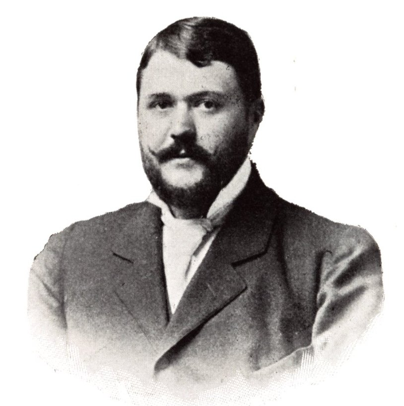 Hadik János (1863-1933) politikus, miniszter, pár napig miniszterelnök